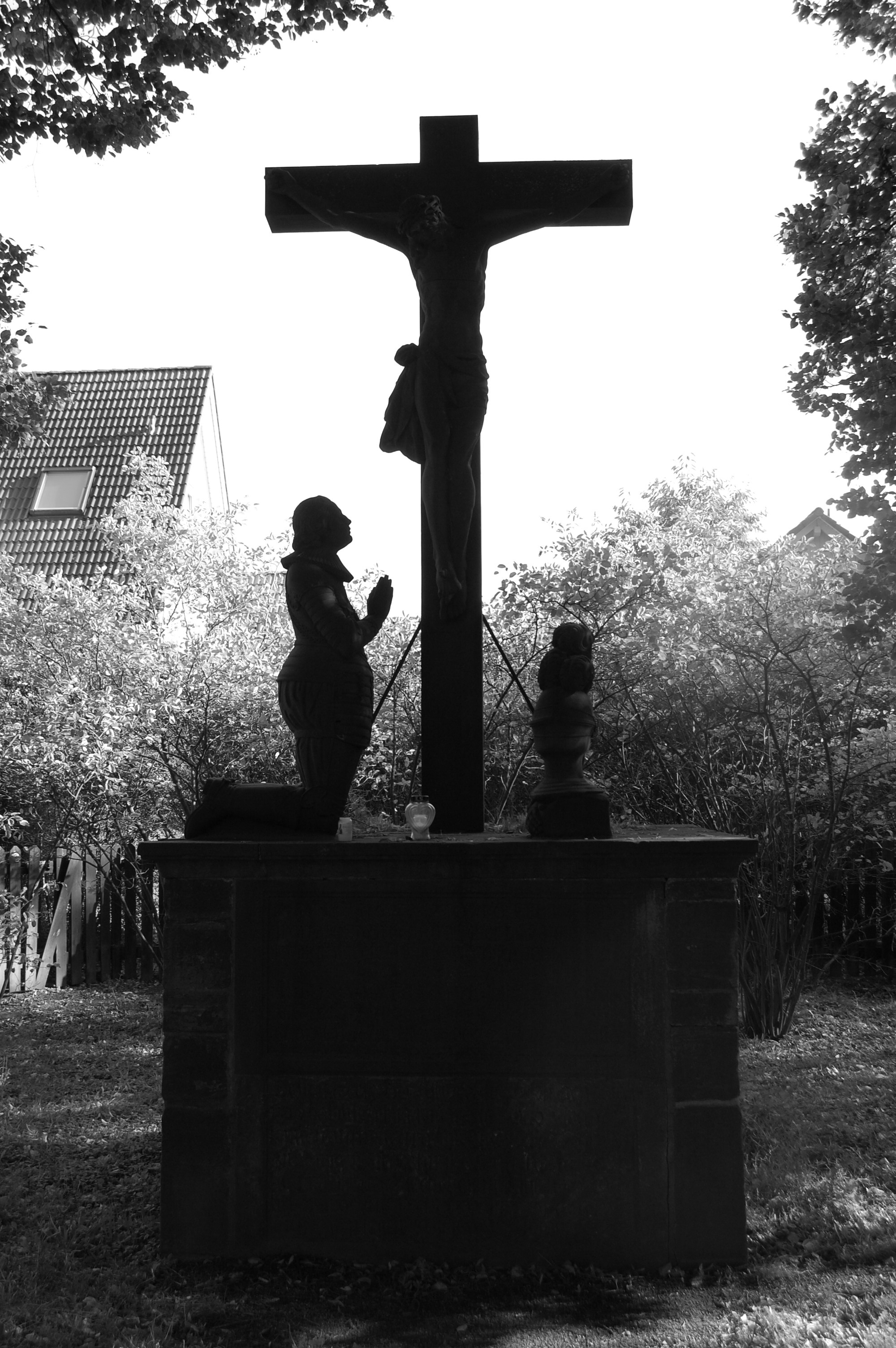 Kreuz/Denkmal für den Ritter Walter von Kerpen (+ 1627) in der Schönbuschallee in Aschaffenburg